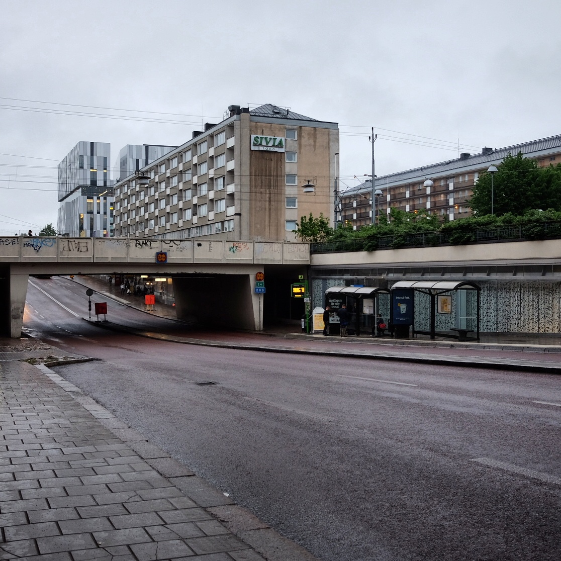 Vaksalagatan med järnvägsbro och Sivia torg i Uppsala.